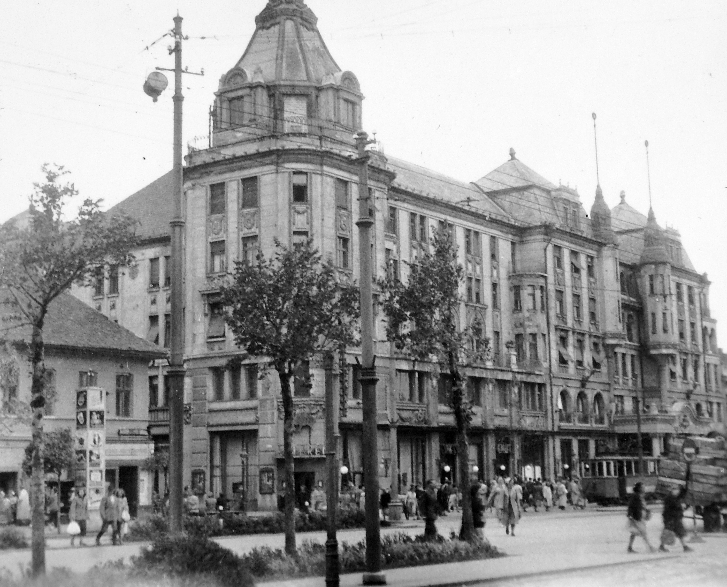 Arany Bika Szálloda. Location: Hungary, Debrecen Tags: tram, street view, ad pillar, public lighting, genre painting, poster Title: Arany Bika Szálloda.